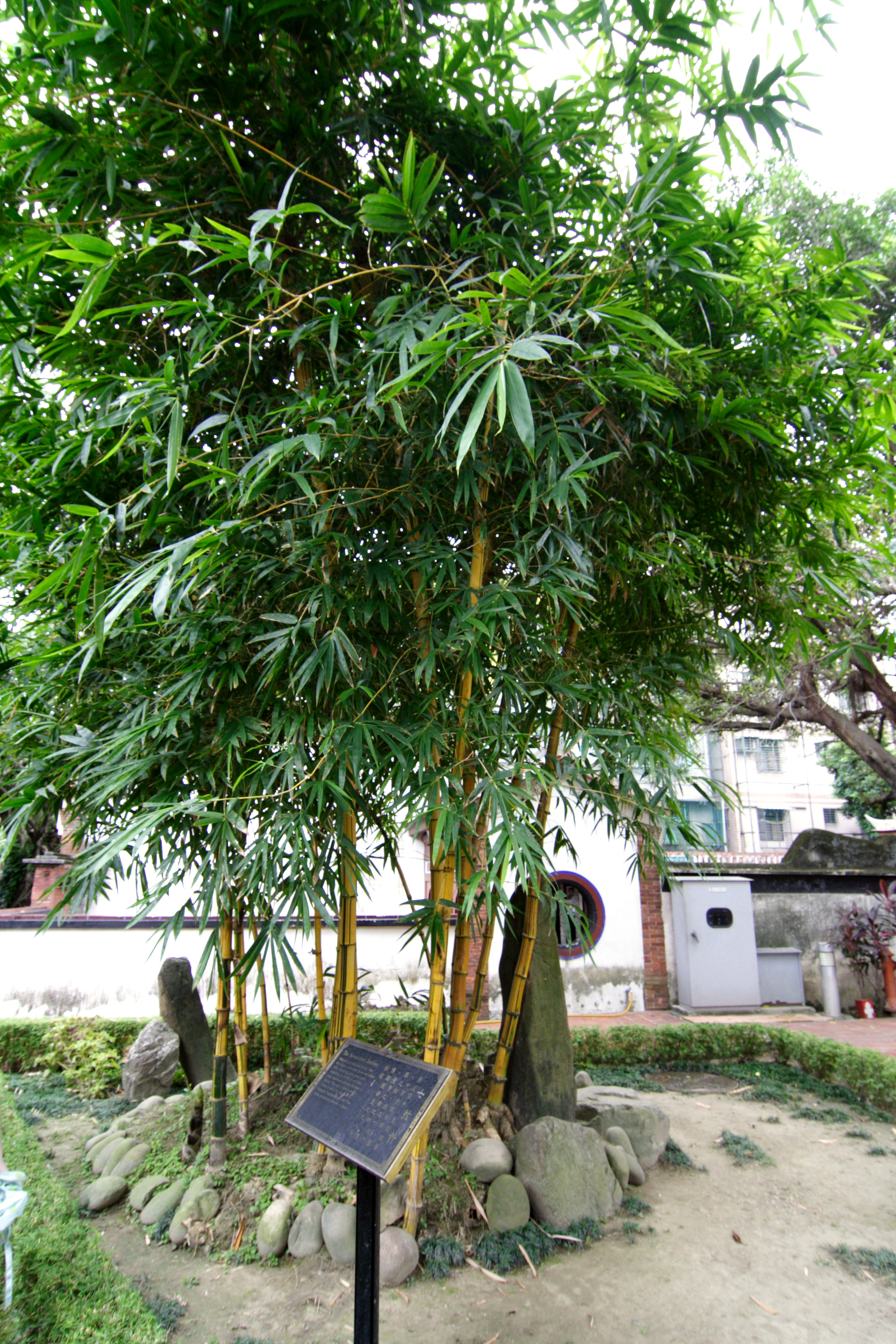 臺灣臺北縣板橋市的林本源園邸中的七絃林